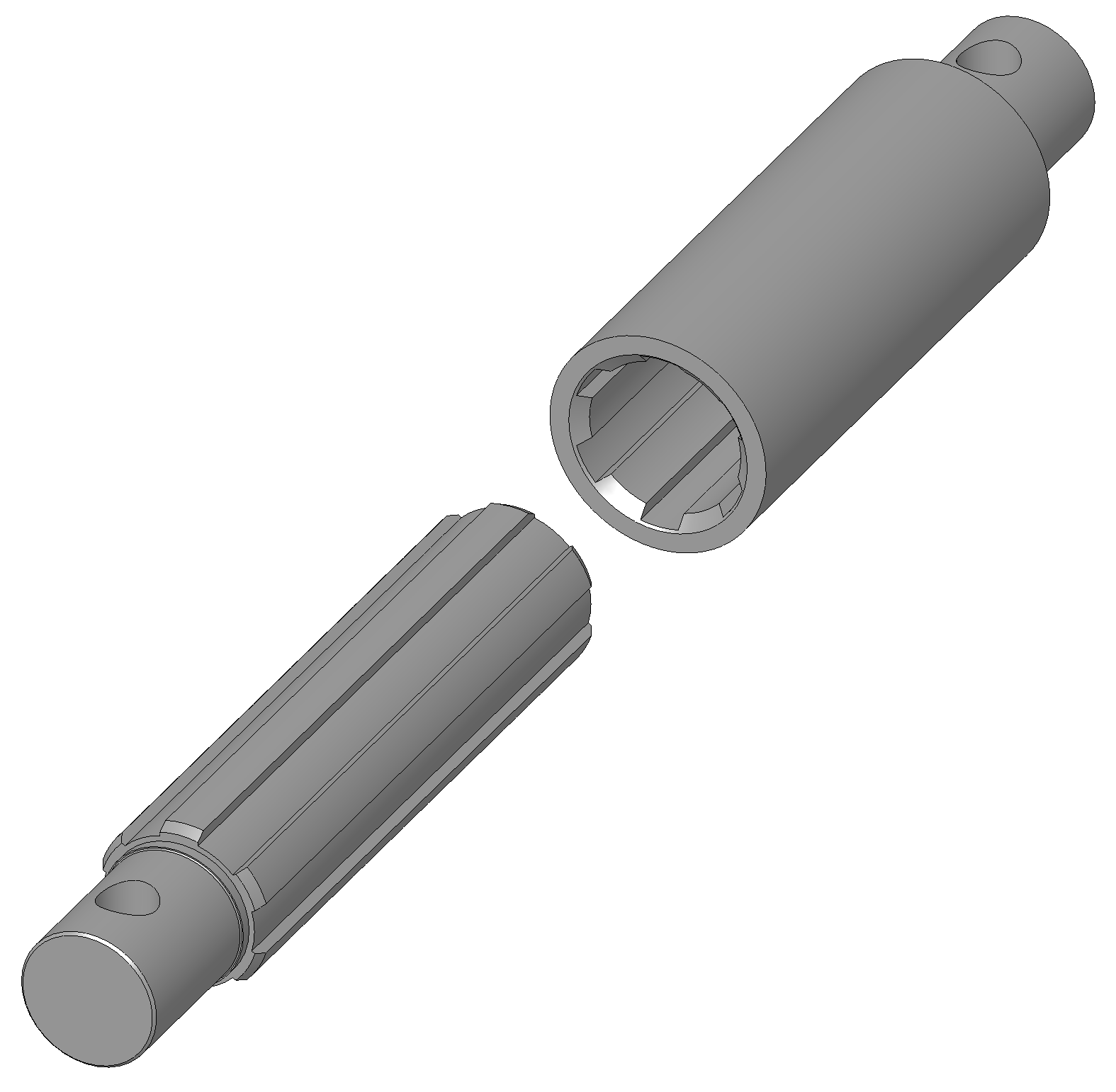 Beispiel fuer eine Keilwelle (unten-links) mit dazugehoeriger Nabe in einer 3D-Ansicht. Die Welle und die Nabe sind abgesetzt und mit einer Querbohrung versehen.